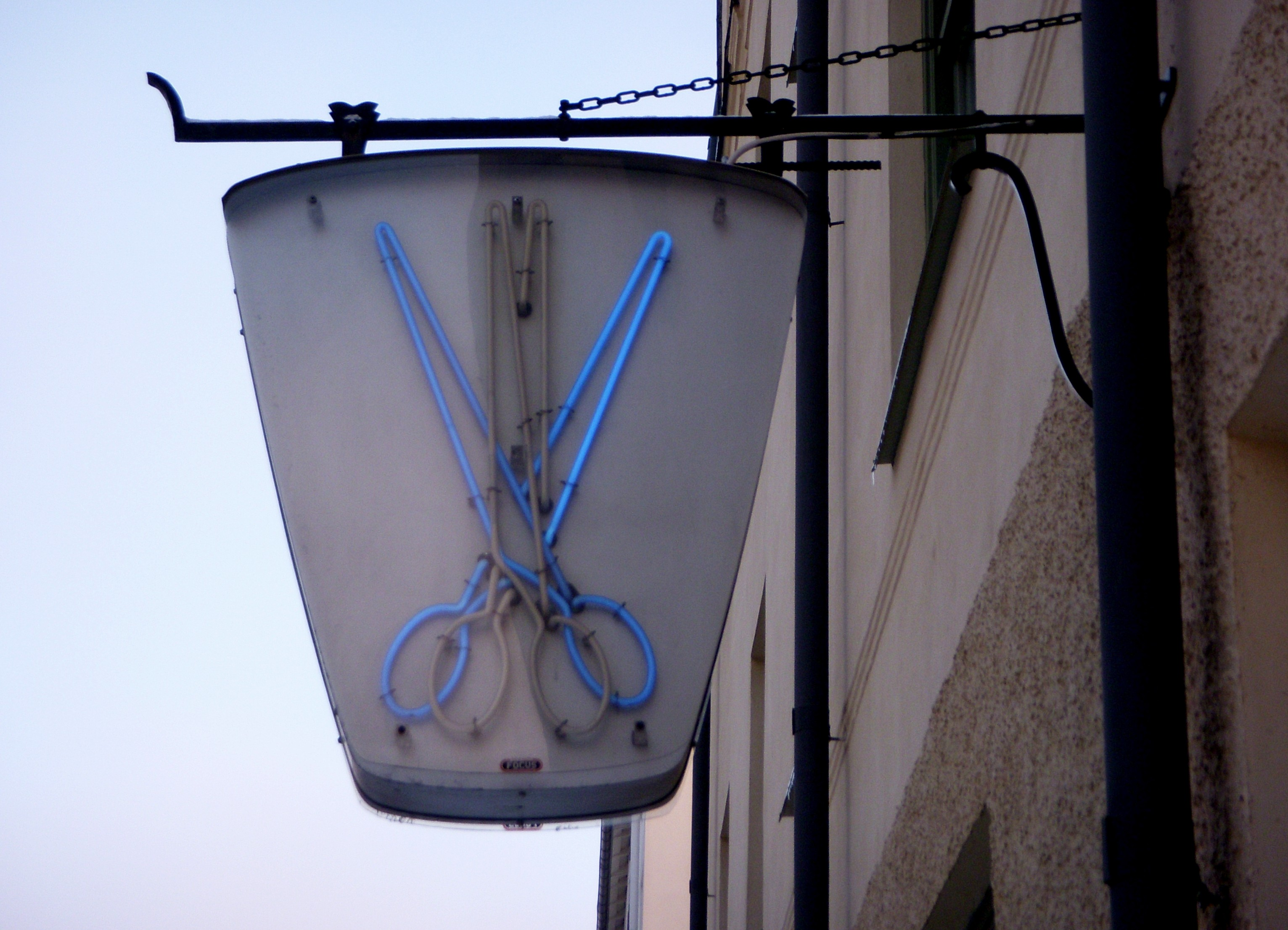 Friörsaxen Hägerstensvägen 103, Stockholm